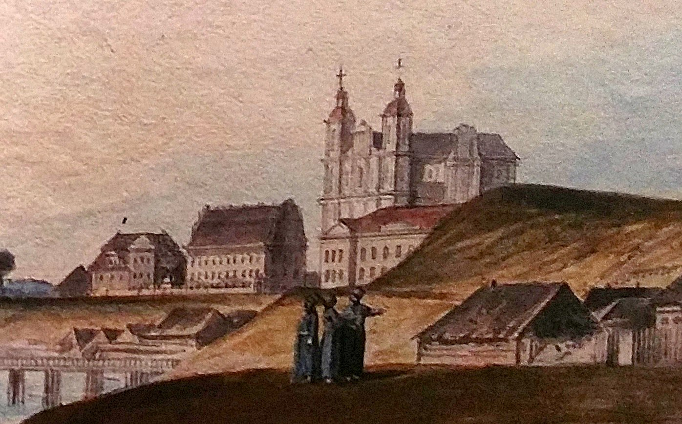 Беларуская (тарашкевіца): Віцебск (Viciebsk), Прачысьценская гара (Pračyścienskaja hara). Царква Прачыстай Багародзіцы